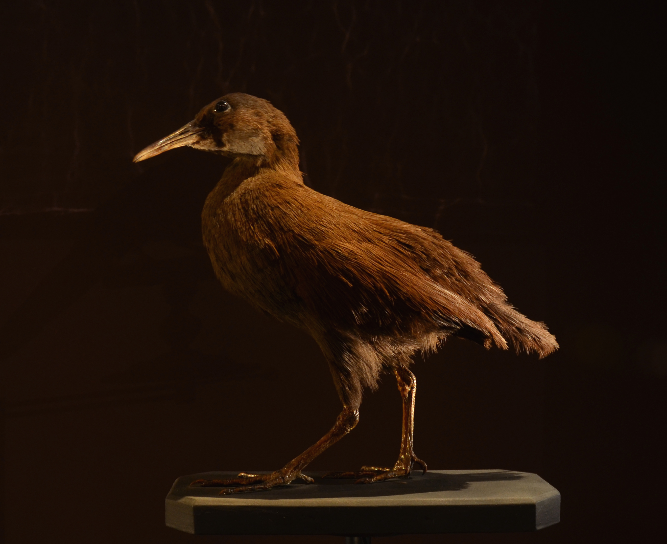 Râle de La Fresnaye ( Gallirallus lafresnayanus ), Nouvelle-Calédonie, espèce éteinte. Specimen naturalisé exposé dans la Grande Galerie de l'Evolution, au Museum National d'Histoire Naturelle, à Paris.